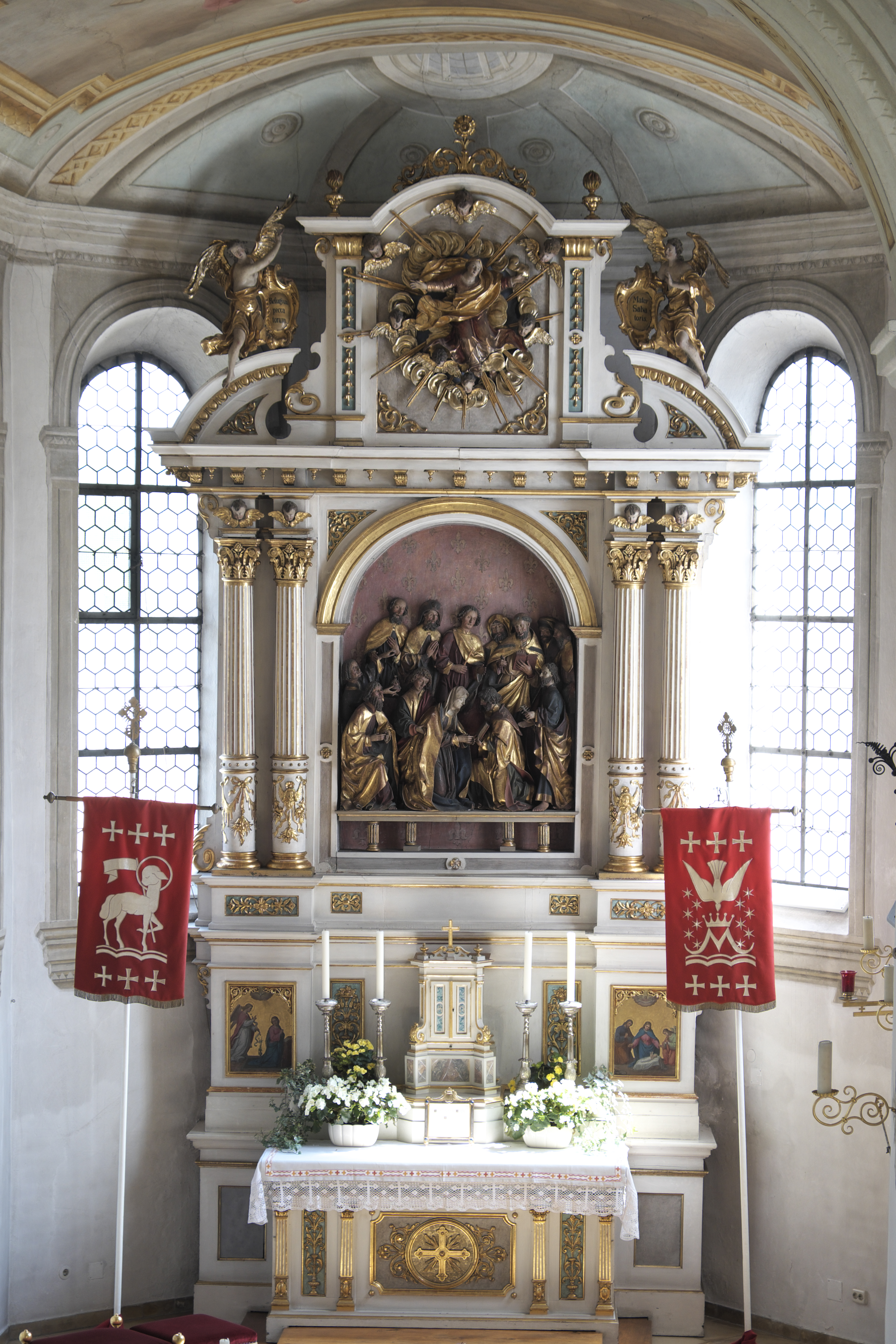 Katholische Pfarrkirche Mariä Himmelfahrt in Täfertingen, einem Stadtteil von Neusäß im Landkreis Augsburg (Bayern), Hauptaltar mit Schnitzgruppe um 1510, Darstellung: Marientod